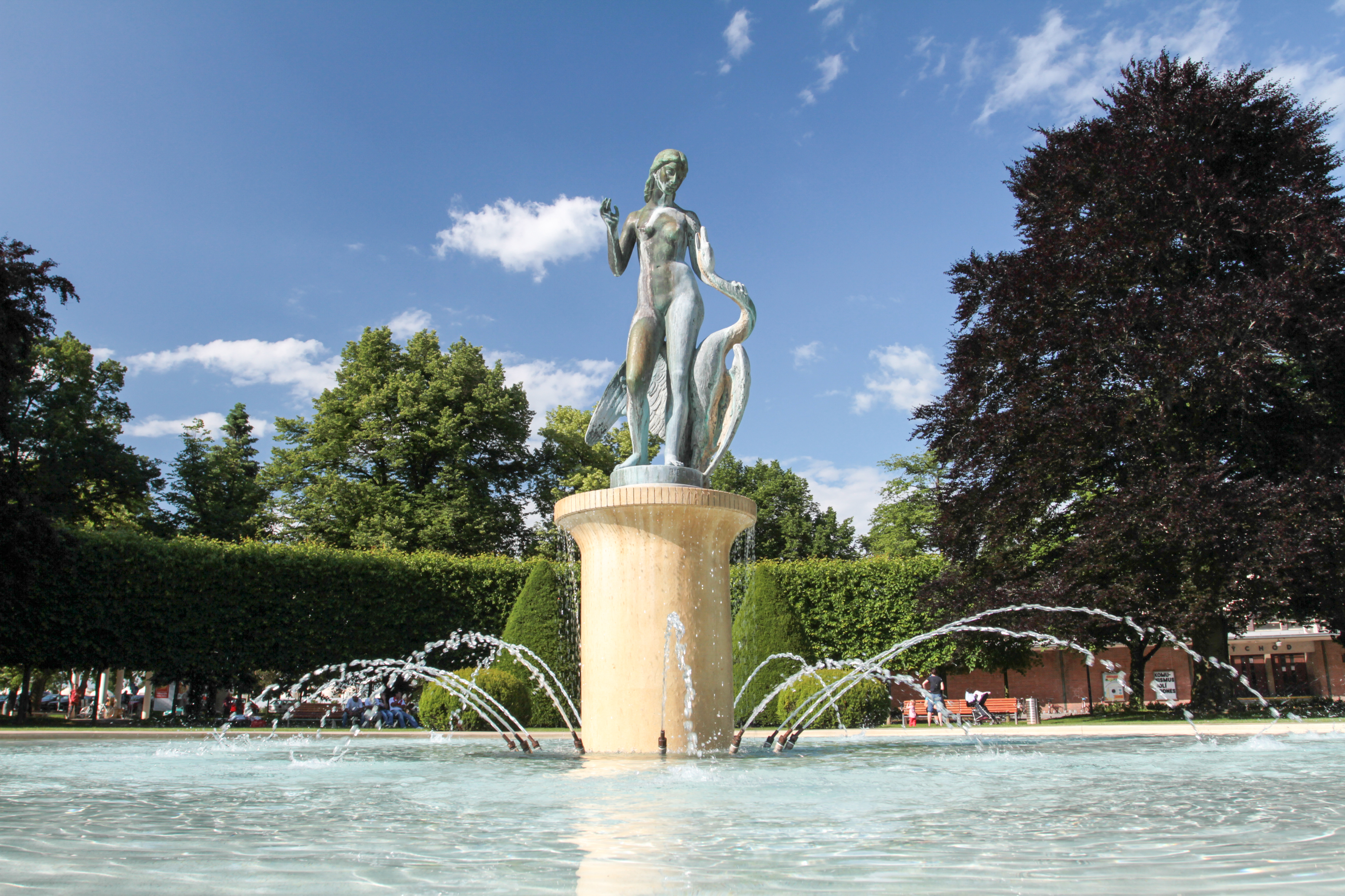 Kolonáda prof. Libenského s kioskem, náměstí T. G. Masaryka, Poděbrady III, Poděbrady.